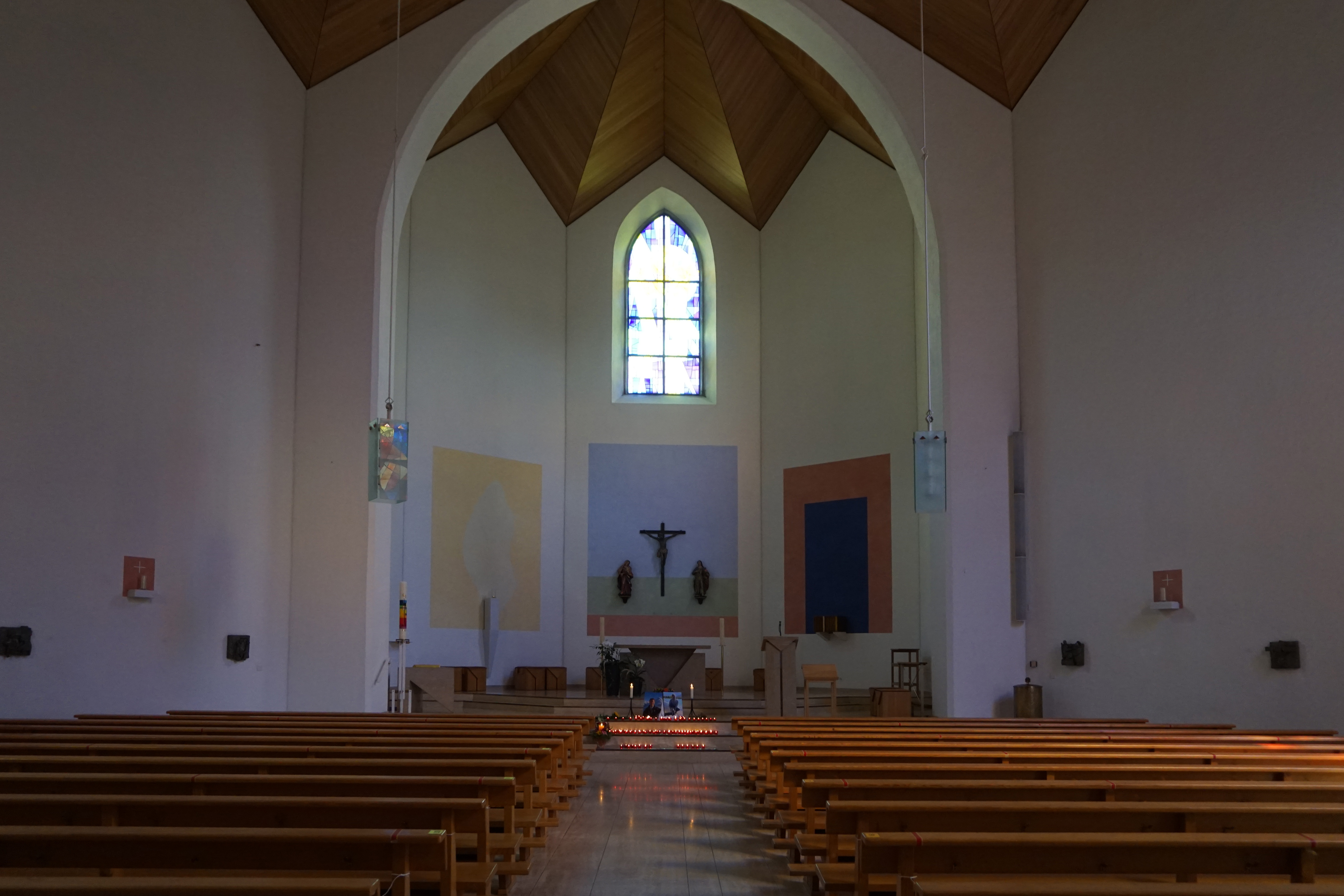 Inneres der Kirche zum Chorraum